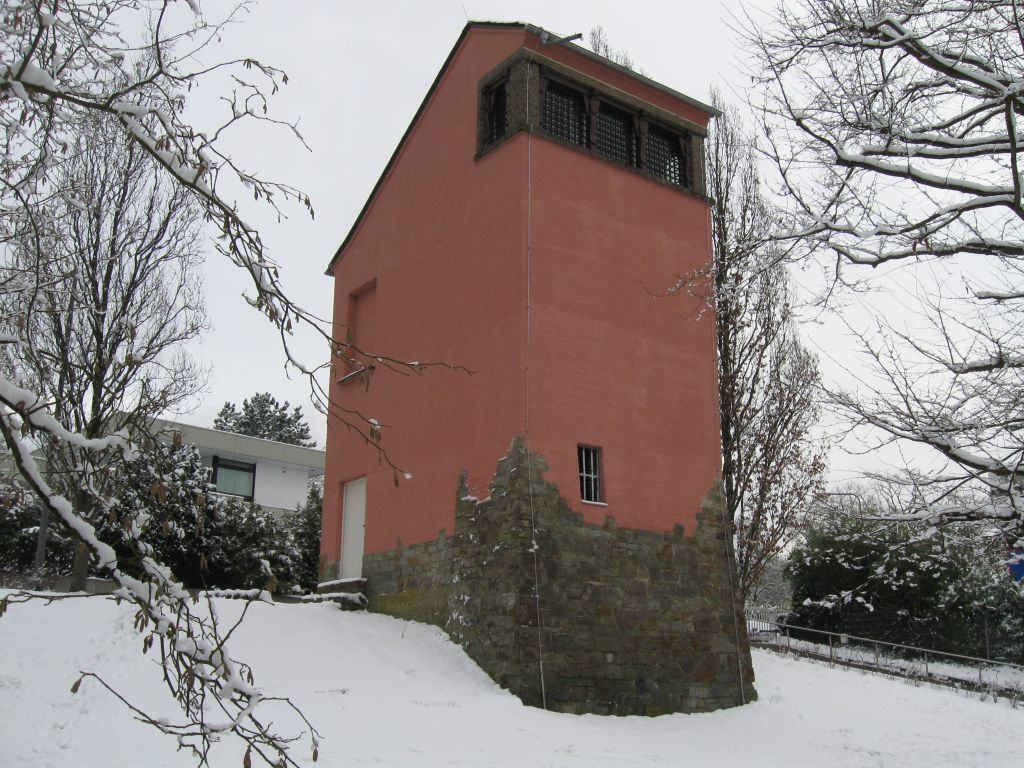 Goethewarte